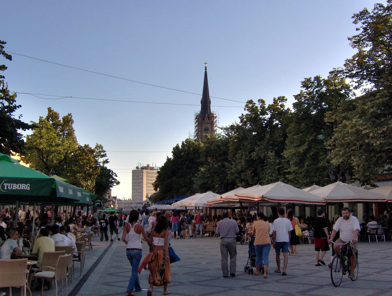 Змај Јовина лети, август 2006.